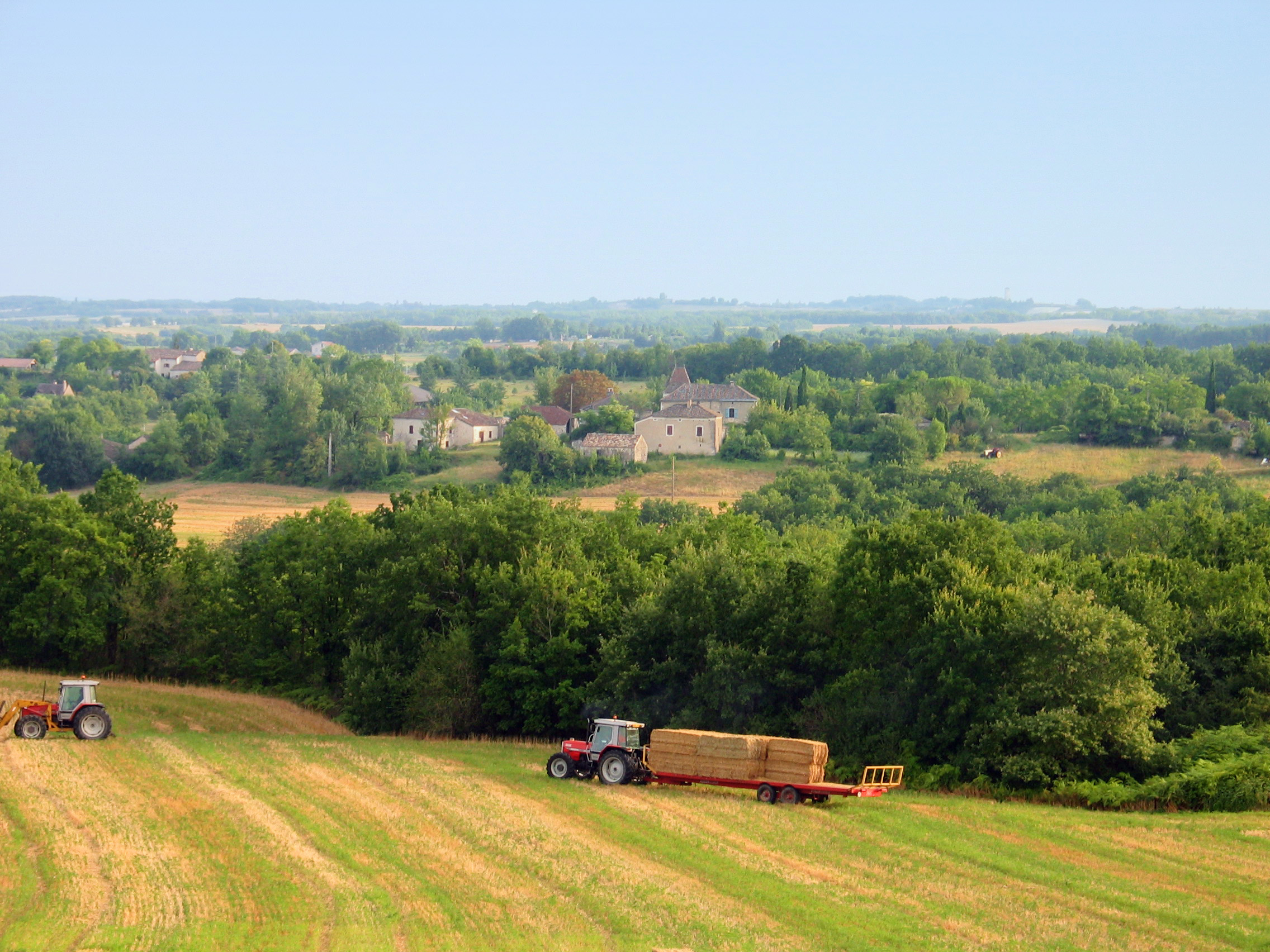 Valprionde, vue du hameau de Paillas depuis le réservoir de Bouteille.